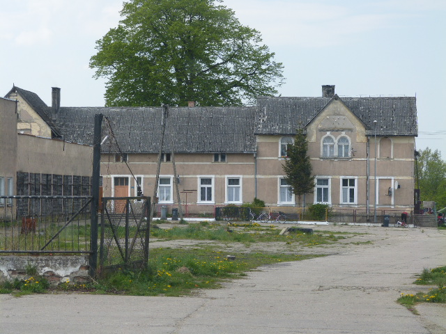 Pławęcino - dawny dwór